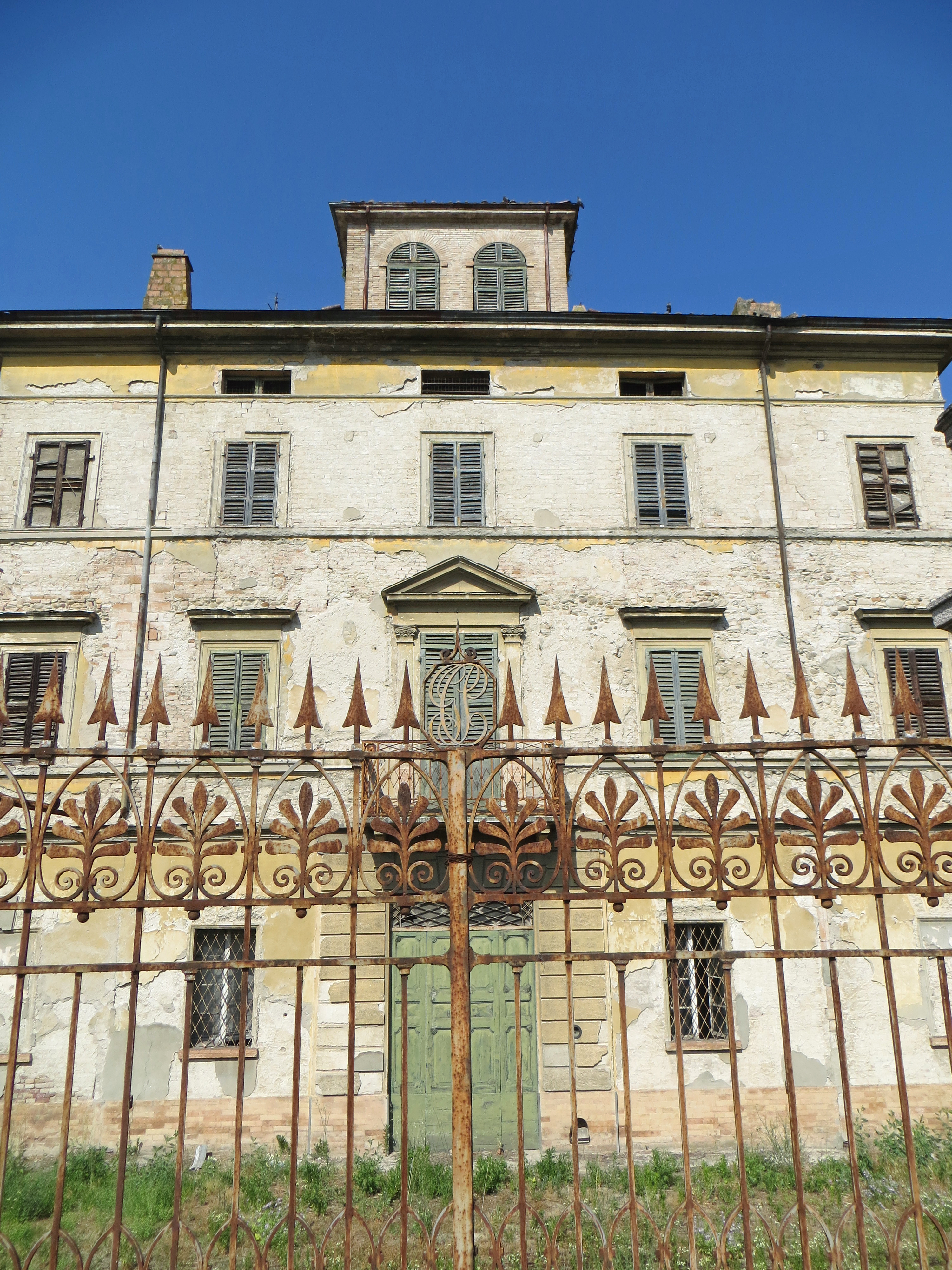 Villa Picedi (Parma) - facciata